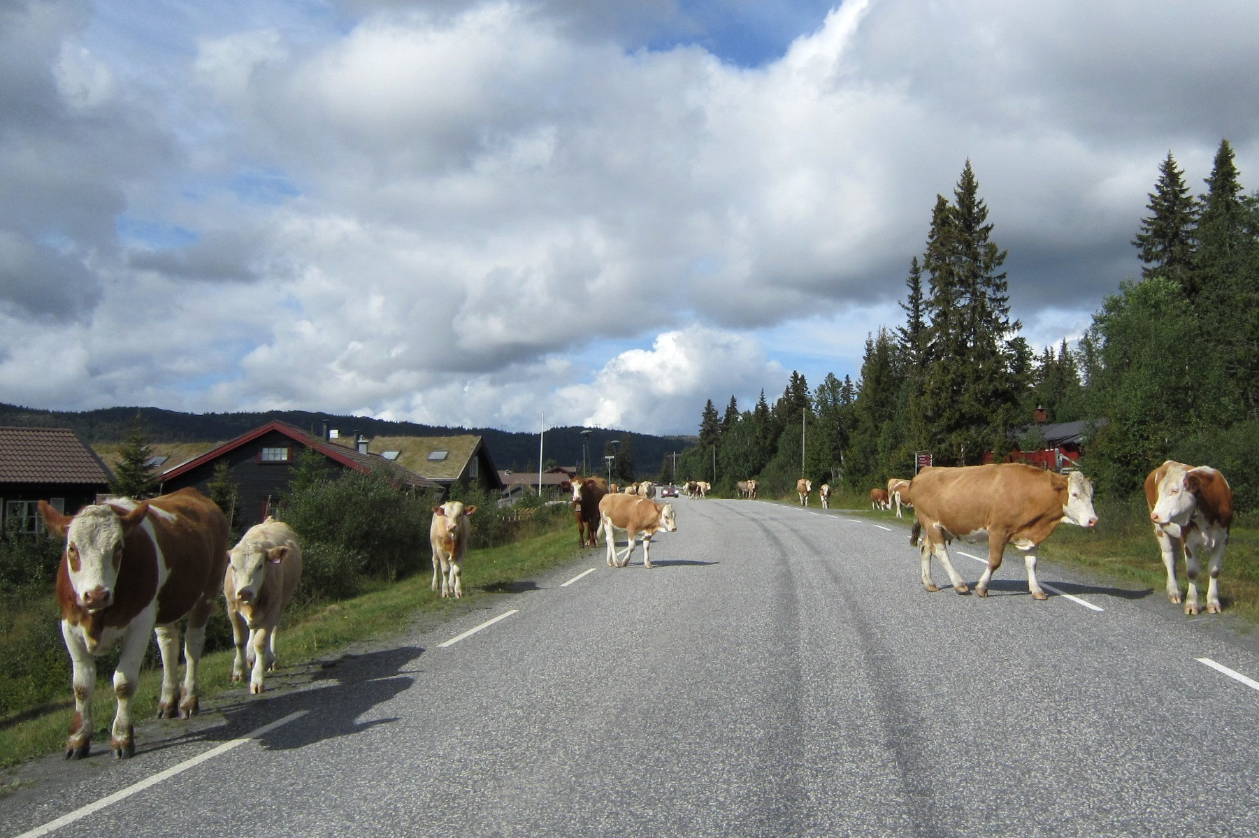 Skeisvegen (fylkesvei 2544, tidl. 337) i Gausdal